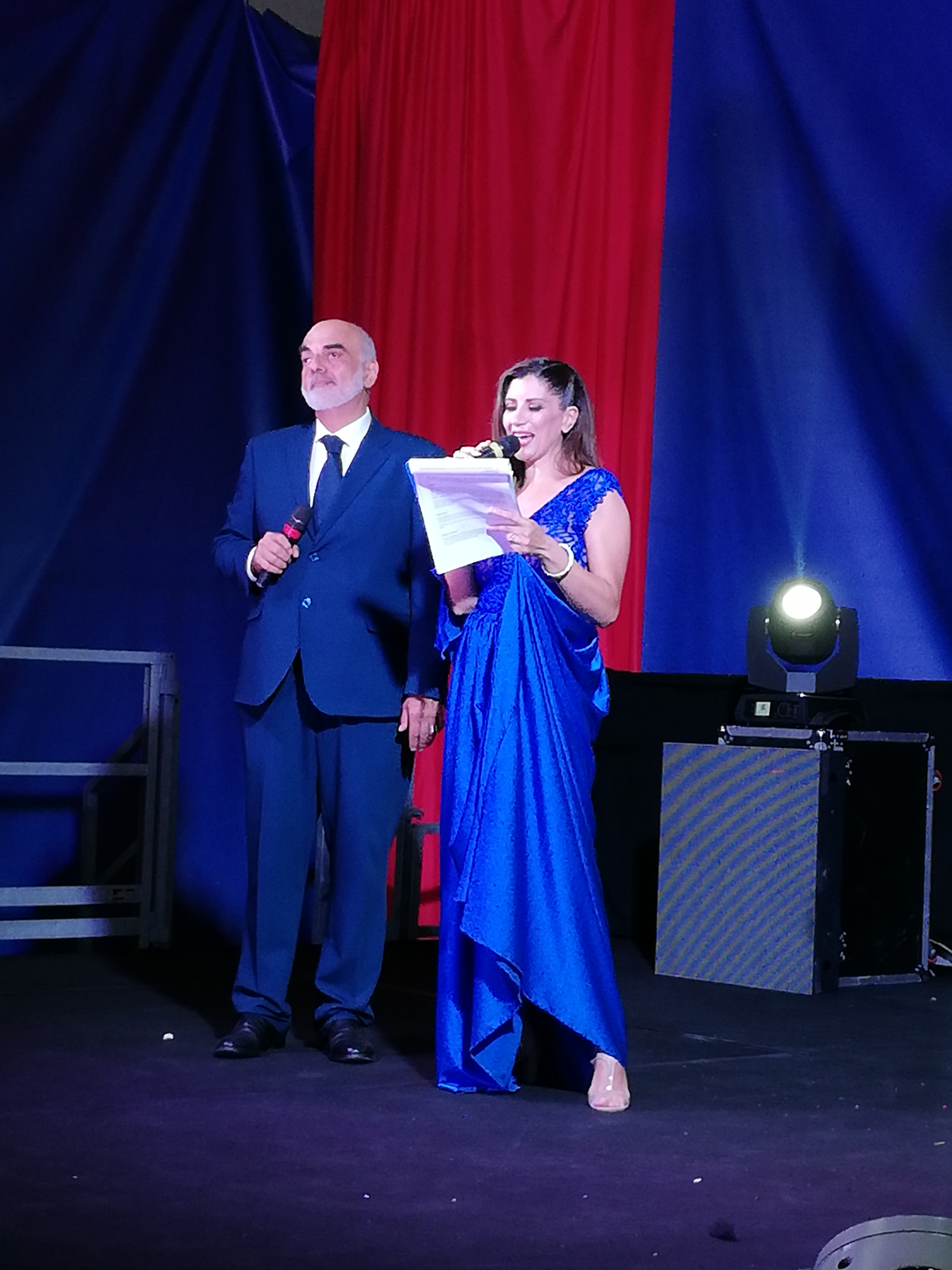 Stefania De Francesco all'evento "Motors&Fashion" alla Base NATO di Lago Patria (Giugliano in Campania)